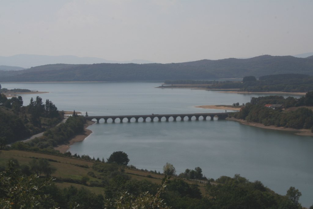 Elosua-Ollerietako zubia, Legutio.